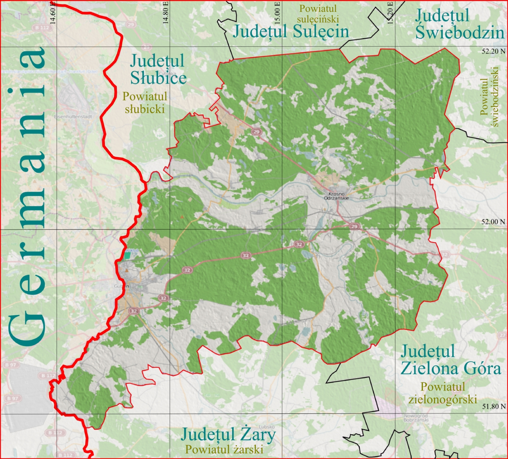 Harta de localizare a Judeţului Krosno Odrzańskie (Powiatului krośnieński) din Voievodatul Lubusz, Polonia.